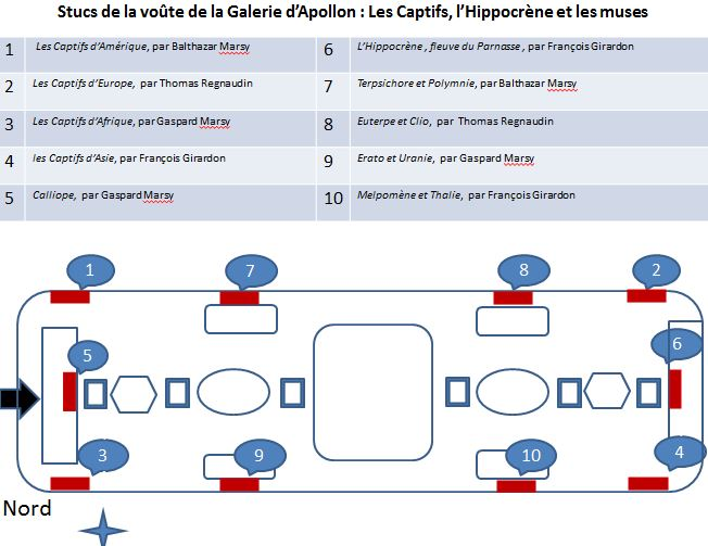 Musée du Louvre Galerie d'Apollon Voûte Emplacement des stucs de la voûte relatifs aux 4 groupes de captifs, à Hippocrène, et aux neuf muses (1663-1665) par Gaspard et Balthazar Marsy, François Girardon, Thomas Regnaudin.